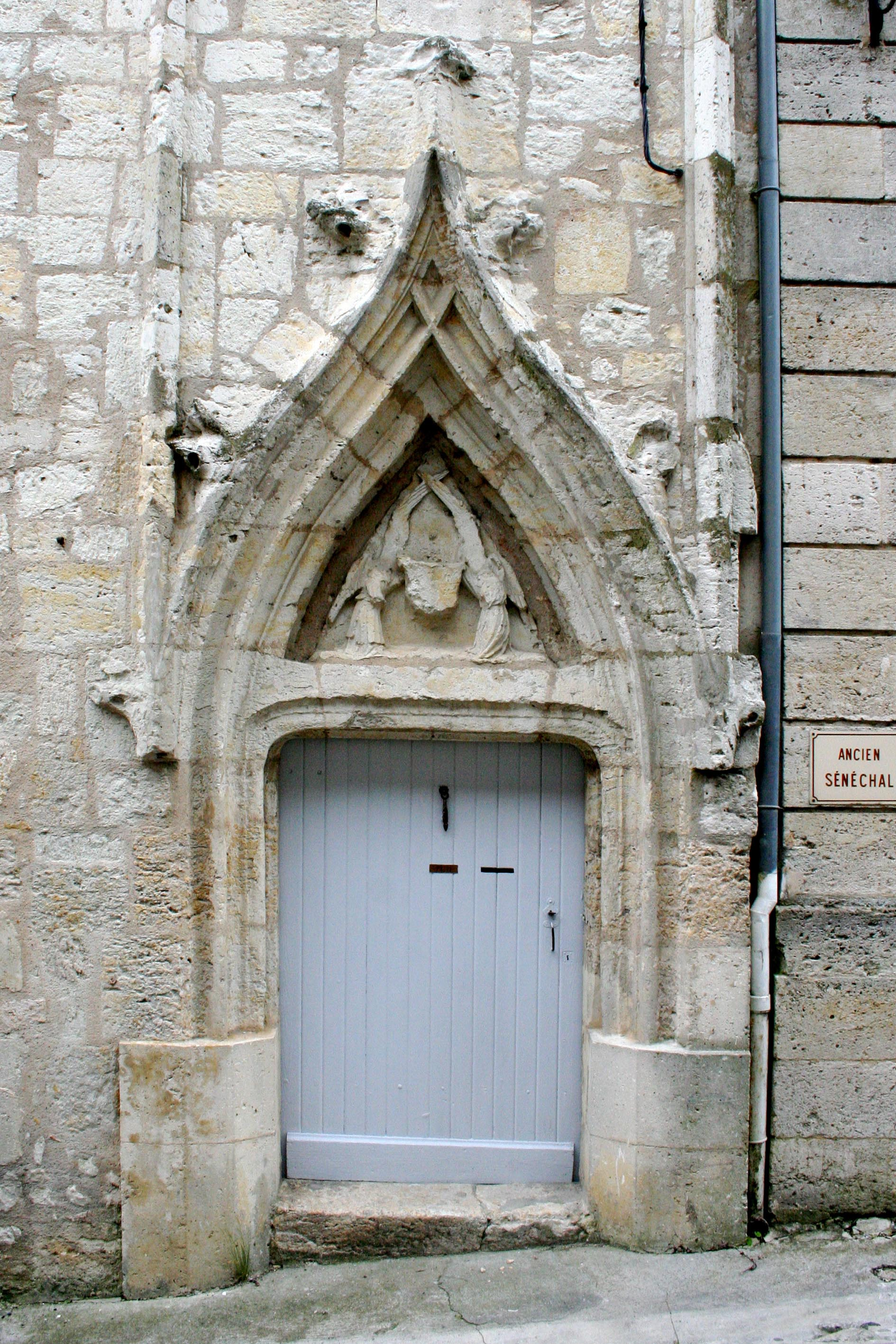 Porte de l'ancienne sénéchaussée, Lectoure (Gers, France)